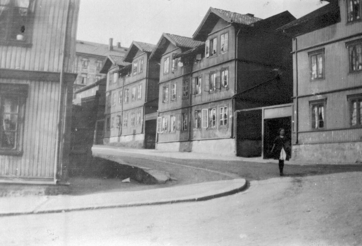 Norderhovgata 1, 3 og 5 på Kampen i Oslo, ca. 1910